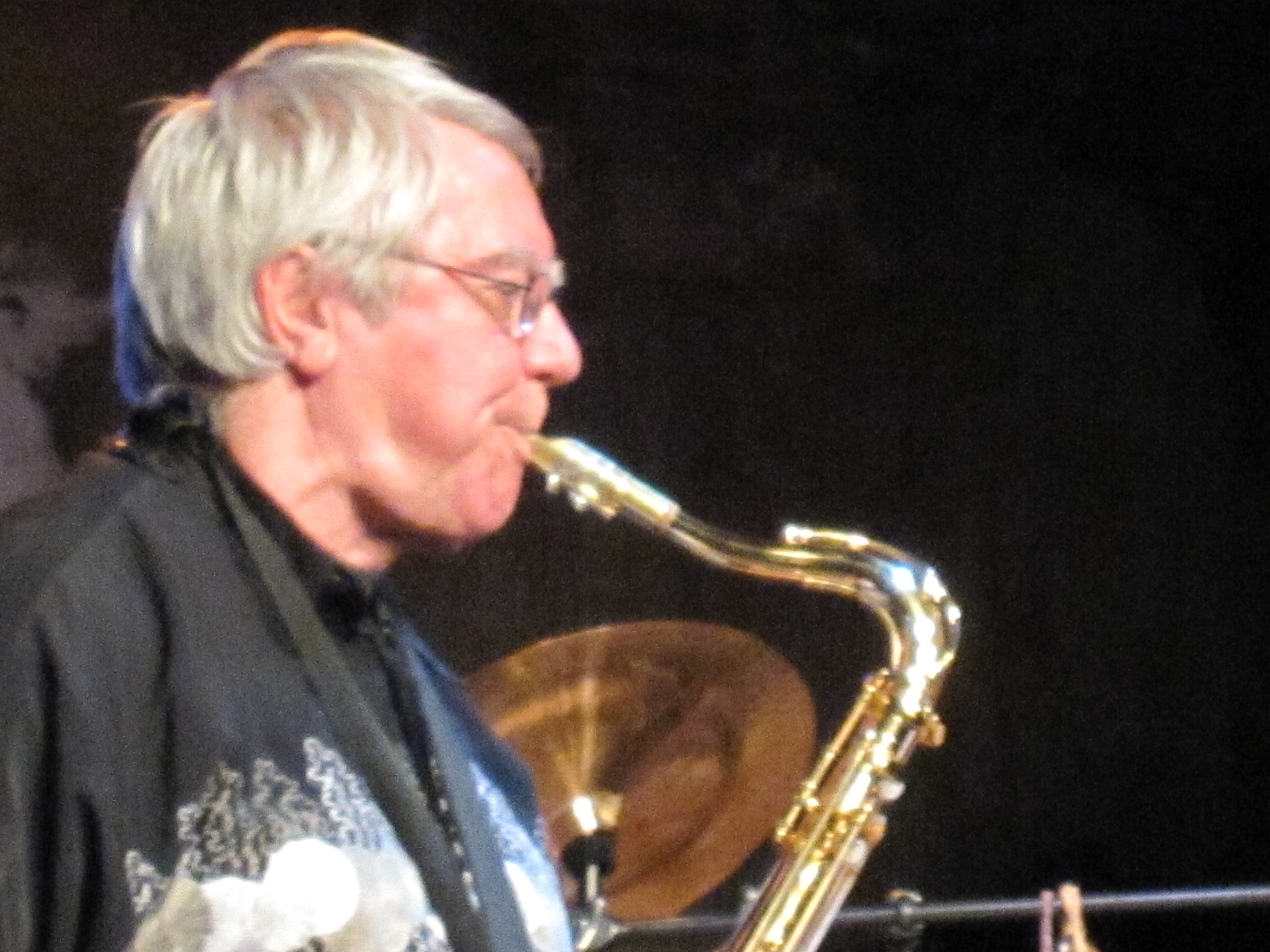 yochk'o seffer au tenor en octobre 2010